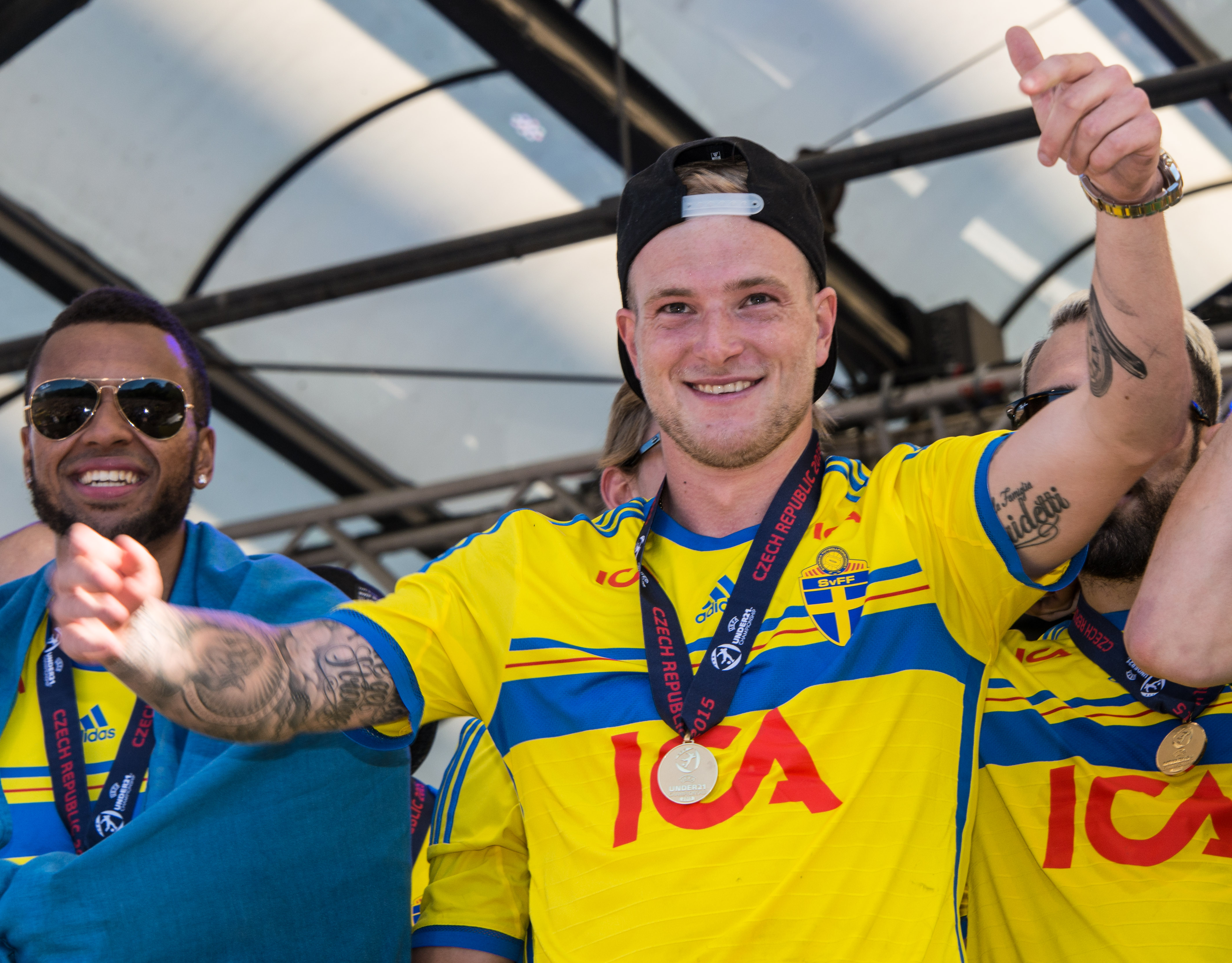 Sveriges U21-landslag blir hyllade i Kungsträdgården i Stockholm den 1 juli av 1000-tals fans efter guldet i U21-Europamästerskapet i fotboll 2015.